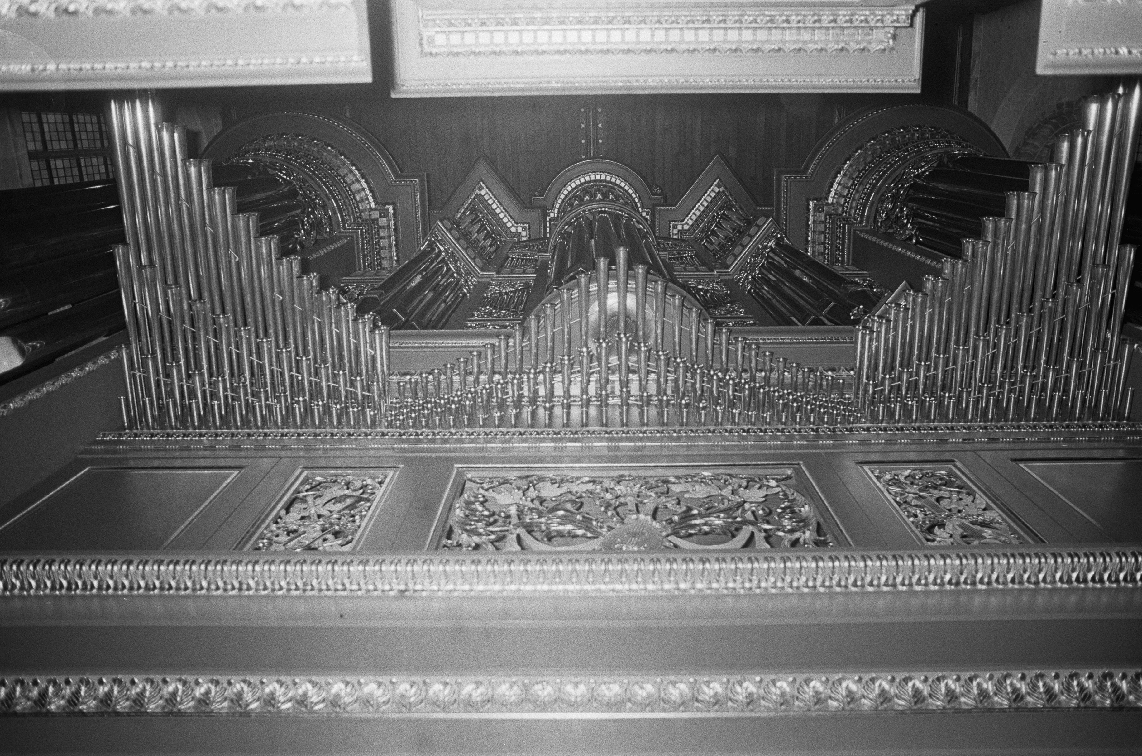 Collectie / Archief : Fotocollectie Anefo Reportage / Serie : Het nieuwe orgel van de St. Laurenskerk te Rotterdam Beschrijving : Een blik van onderaf op het orgelfront Datum : 6 december 1973 Locatie : Rotterdam, Zuid-Holland Trefwoorden : kerken, orgelfronten, orgels Instellingsnaam : Sint-Laurenskerk Fotograaf : Fotograaf Onbekend / Anefo Auteursrechthebbende : Nationaal Archief Materiaalsoort : Negatief (zwart/wit) Nummer archiefinventaris : bekijk toegang 2.24.01.05 Bestanddeelnummer : 926-8719